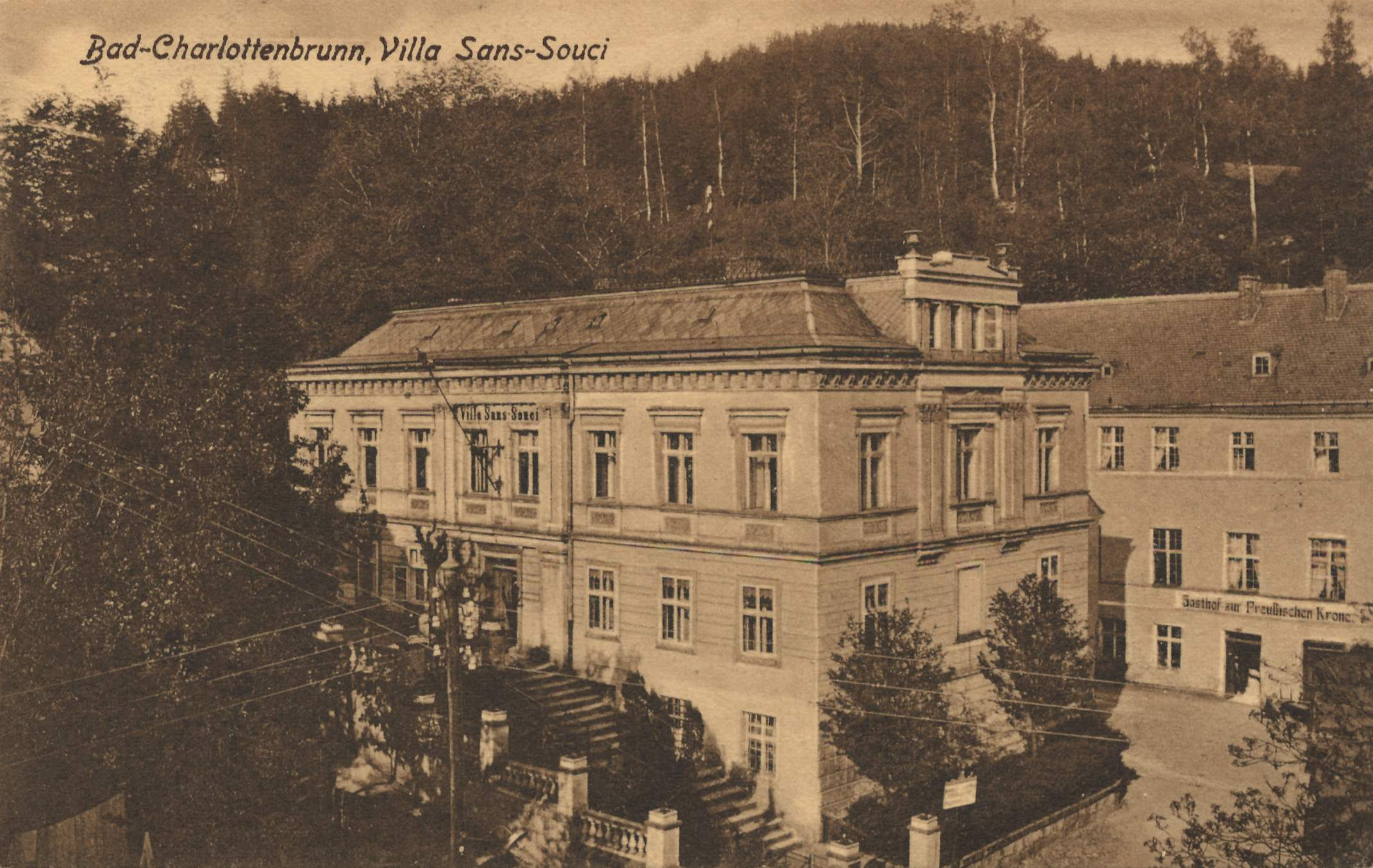 Jedlina-Zdrój (niem. Bad Charlottenbrunn)